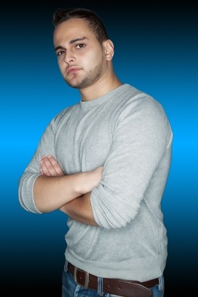 Davide Spiga